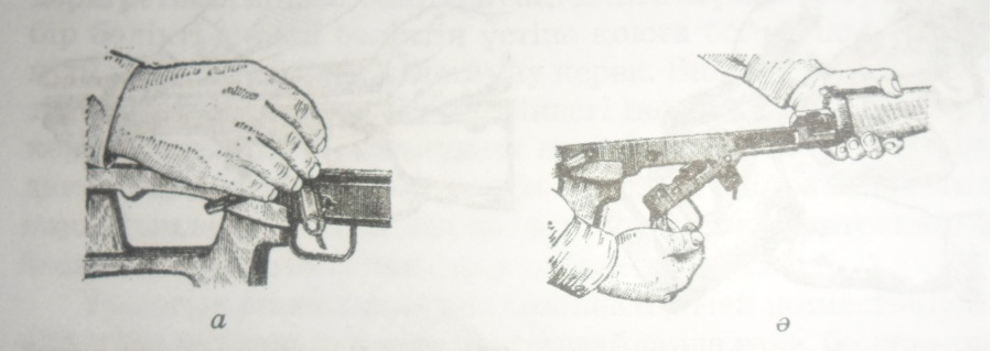 Handhabung des SWD-Scharfschützengewehres.